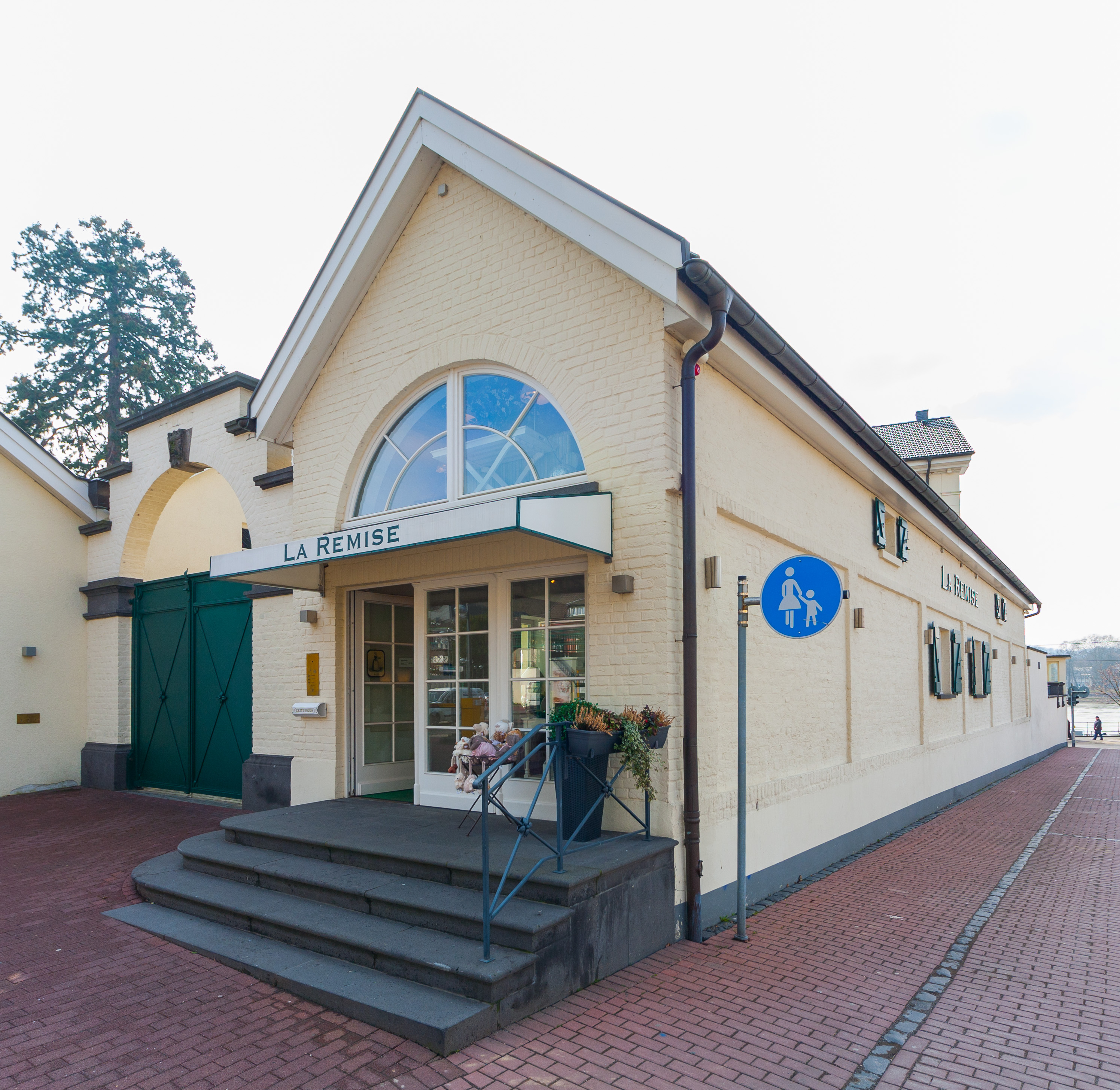 Immenhof, Rheinallee 6, Königswinter: Wirtschaftsgebäude an der Meerkatzstraße